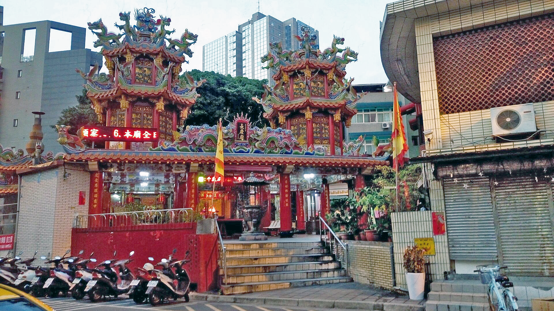 長慶廟位在臺灣臺北市古亭地區。廟宇前有戲台一座（照片右側建築），照片後方遠景大廈為「大都市國際中心」。